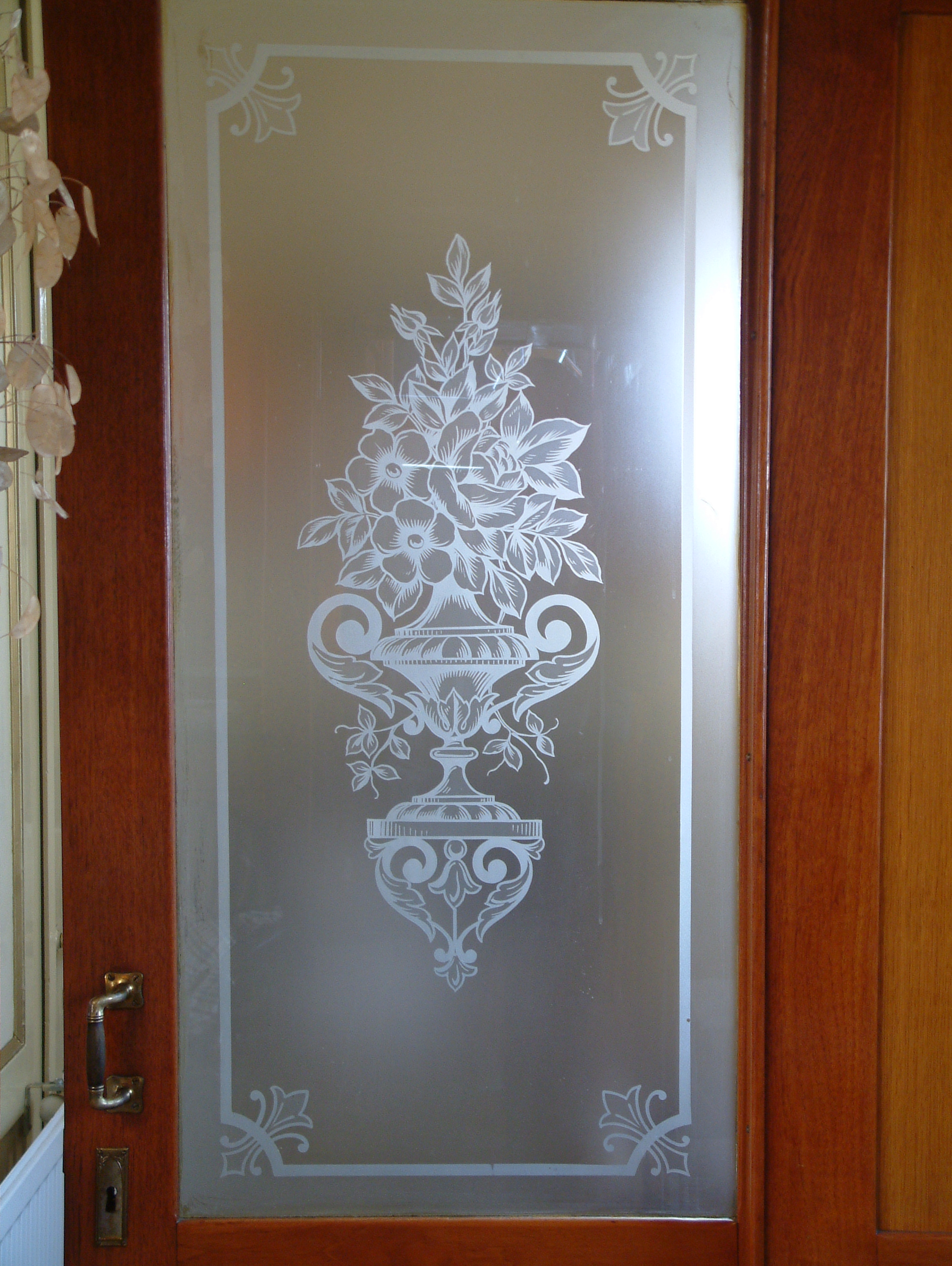 De roef van de TERRA NOVA, het schip van de LVBHB, de Parel van de Rijn.